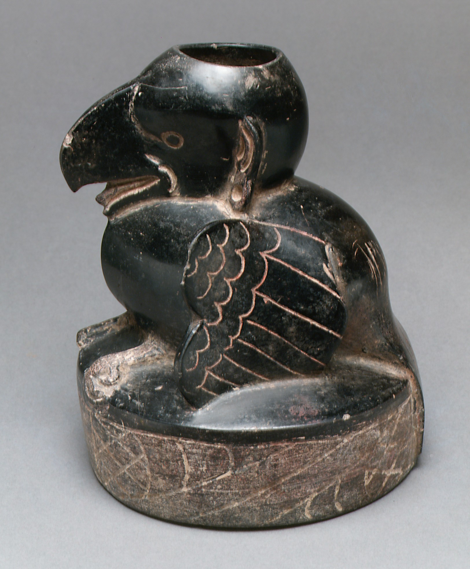 Olmec; Vessel; Ceramics-Containers